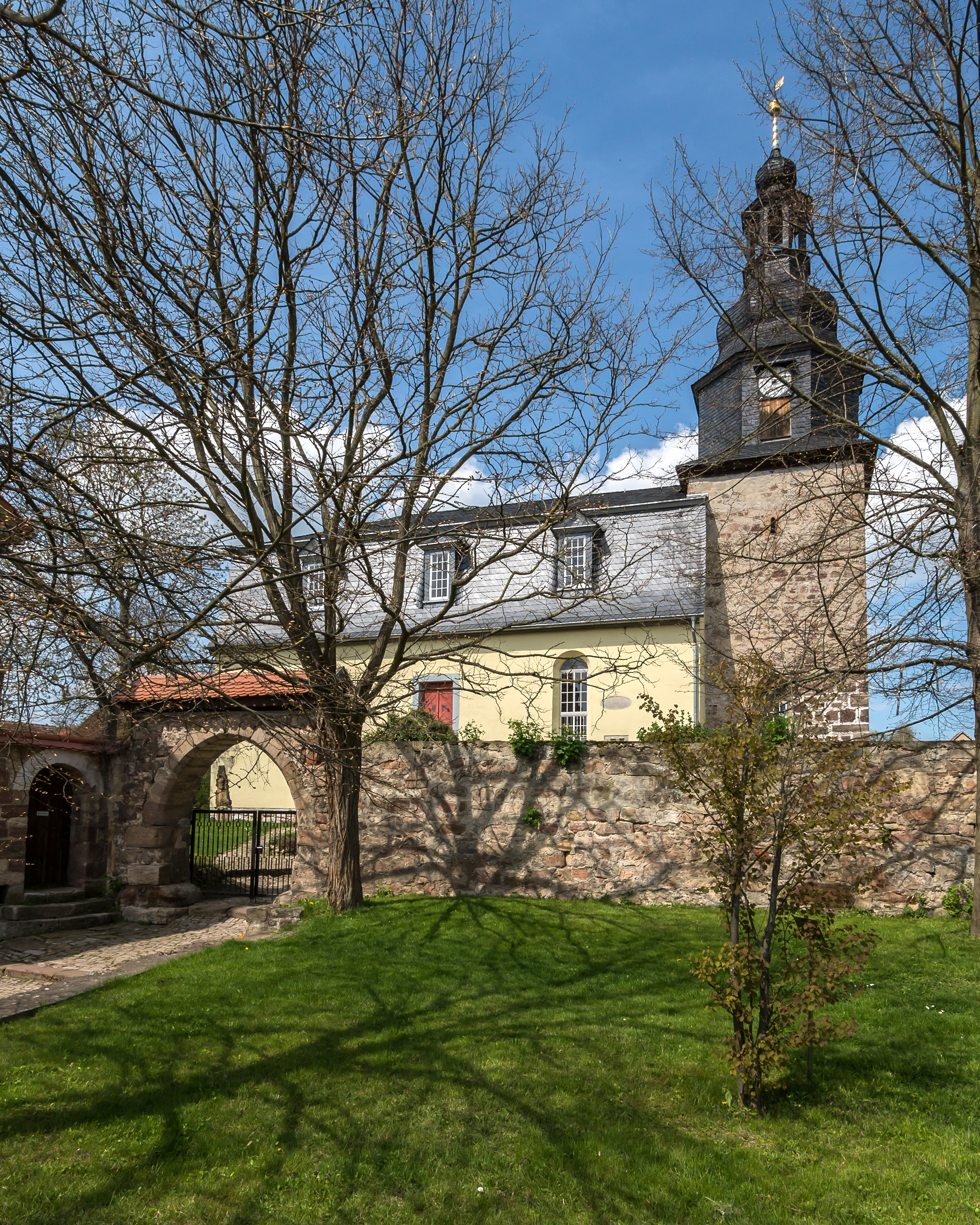 Hohenfelden St. Burkhard